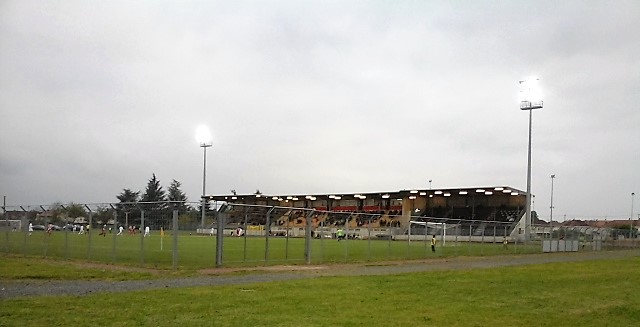 Match de football au stade de la Montée Rouge à Châtellerault (86100, France), le 14 mai 2016.